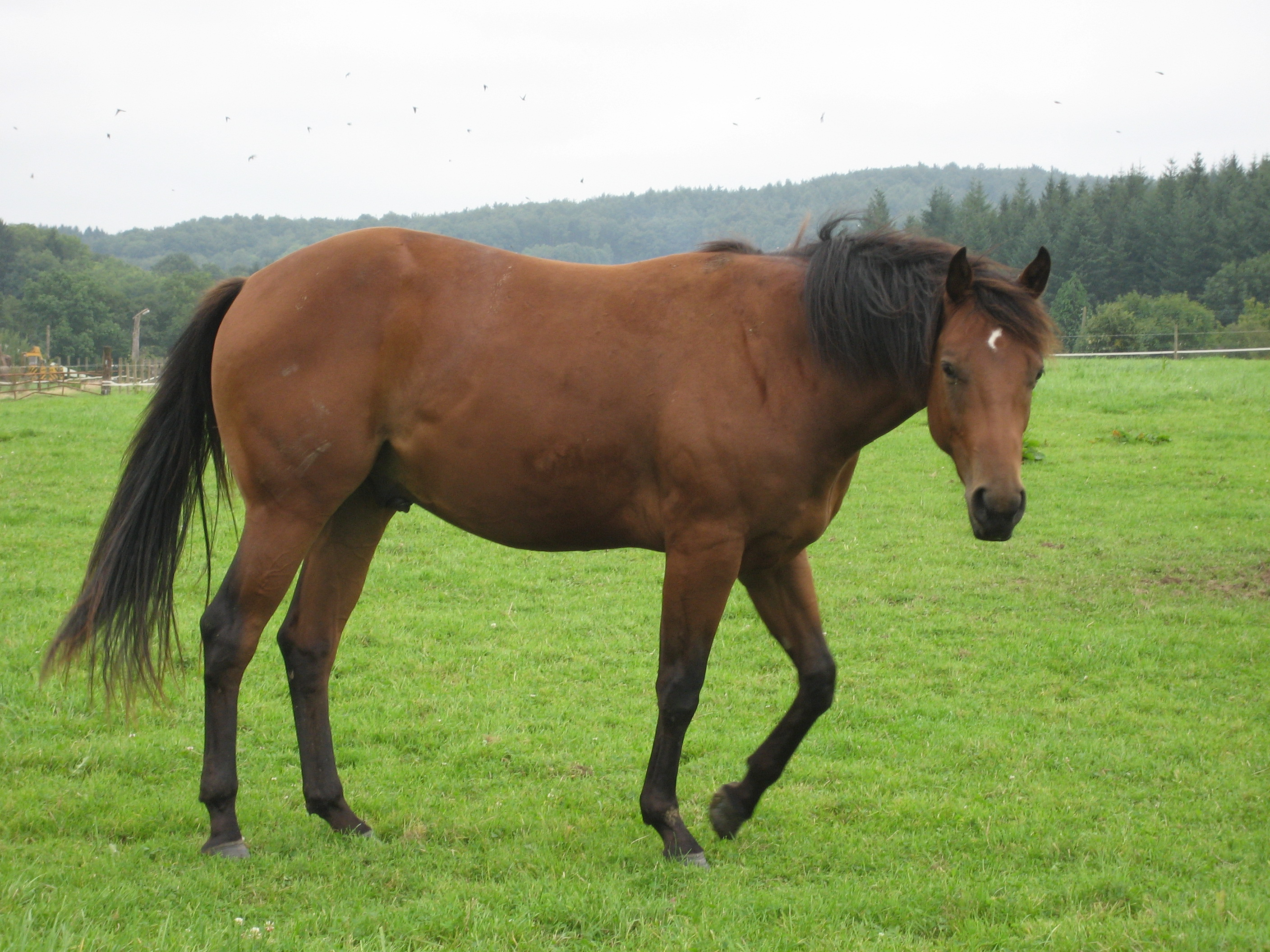 Un Quarter Horse de robe baie